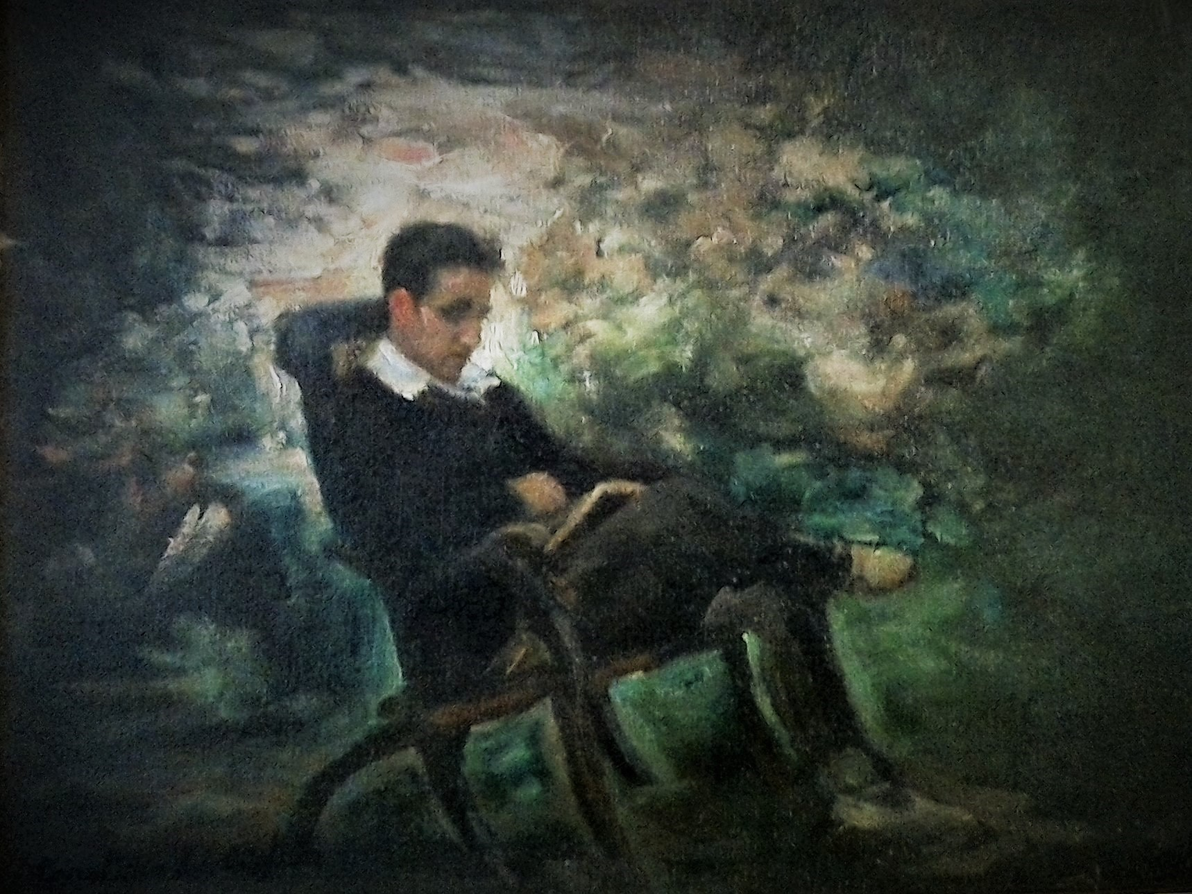 oleo sobre lienzo